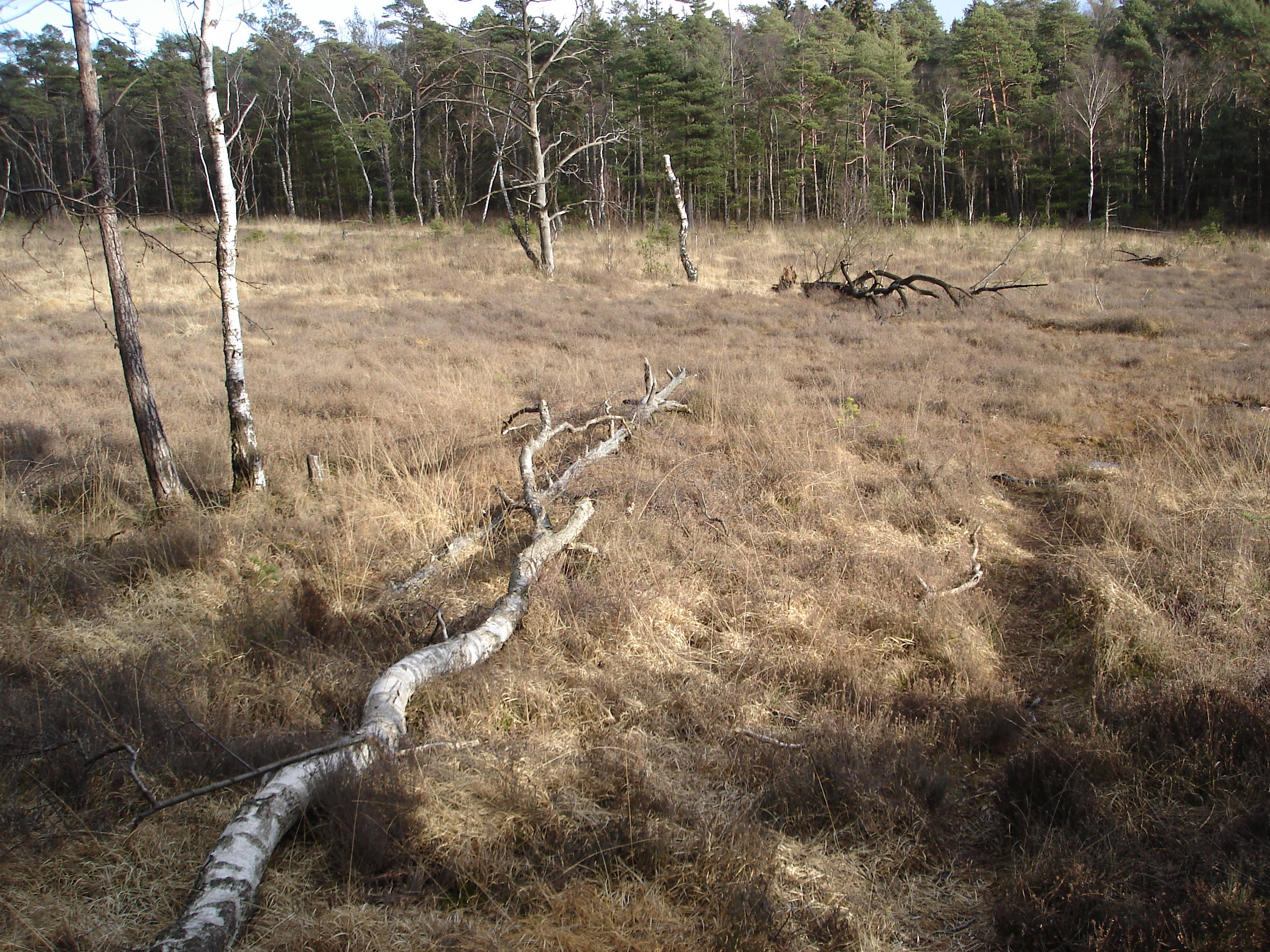 Hochmoor Hiddeser Bent in Detmold, Kreis Lippe, Nordrhein-Westfalen, Deutschland; gelegen im Naturschutzgebiet „Donoperteich–Hiddeser Bent“